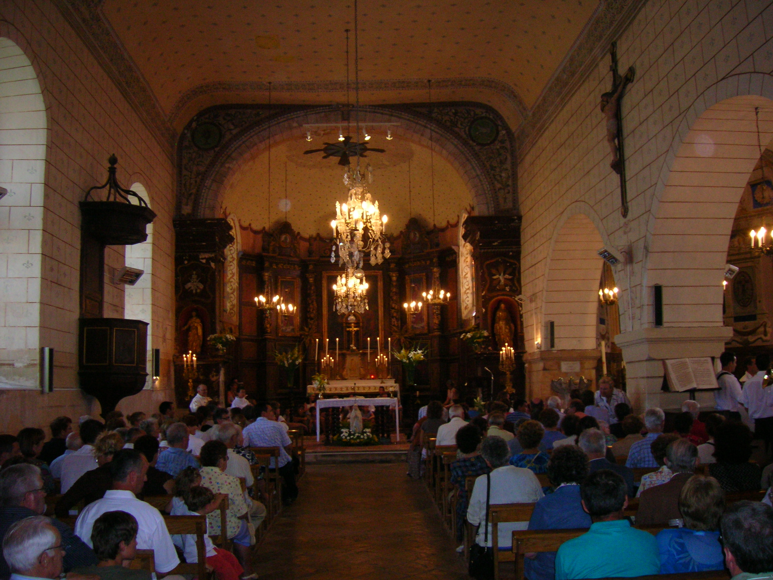 église de baigts (40)